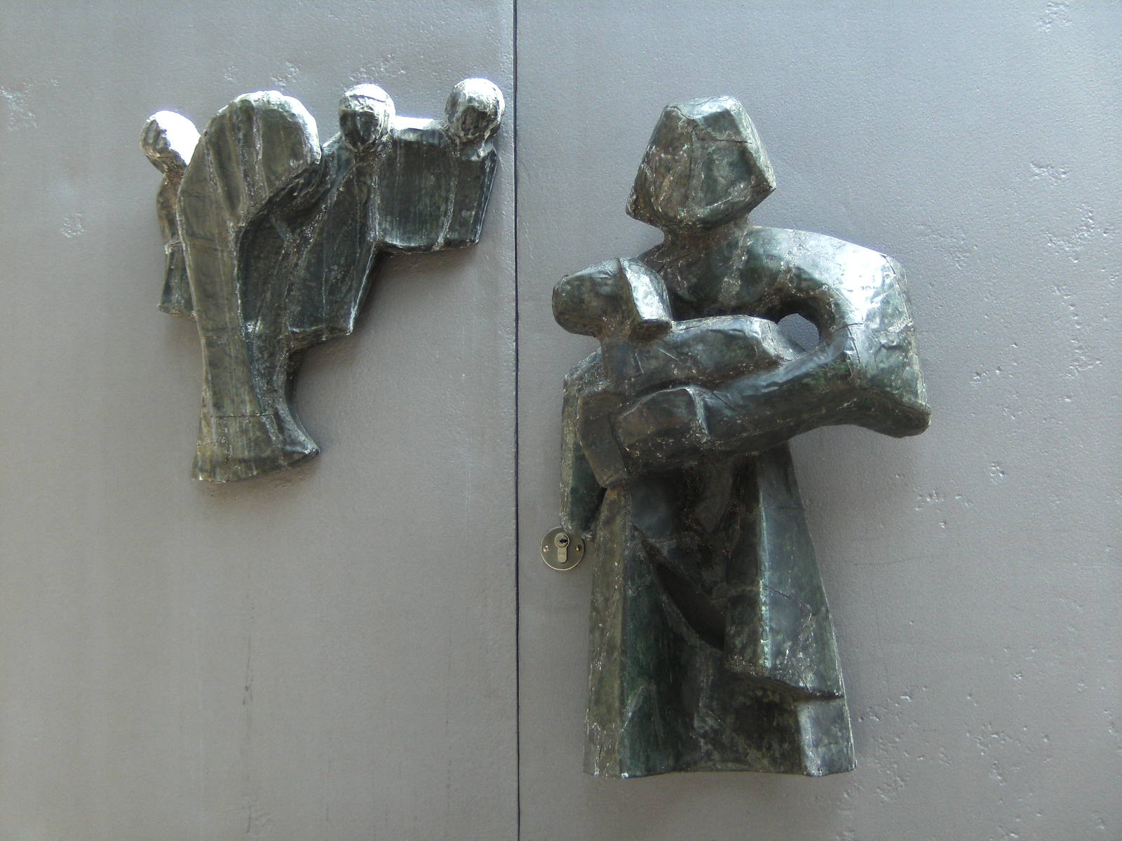 Handgrepen toegangsdeur van een gebouw van het Buiskensklooster, nu Historisch archief Deventer. Gemaakt in ca 1975 door Jeanot Bürgi deelreconstructie in 2010 door Károly Szekeres.